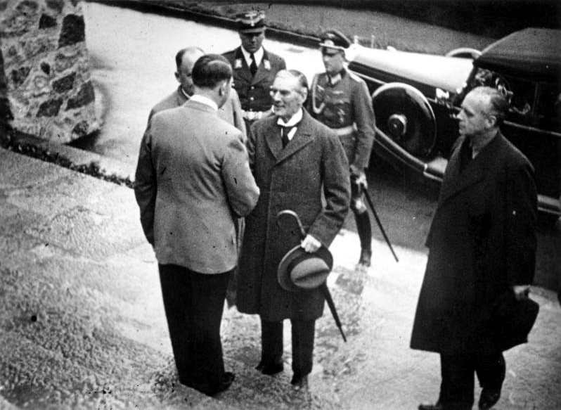 Zentralbild / 16.9.1938 / Premierminister Chamberlain bei Hitler 1938 Am 13.9.1938 schlug Chamberlain Hitler eine Aussprache über die Abtrennung des Sudetengebietes vor. Das Ergebnis der Münchener Konferenz zeigte auch Chamberlains Verrat am Weltfrieden und der Unabhängigkeit der Völker. UBz: Chamberlain stattet Hitler auf dem Obersalzberg am 15.9.1938 einen Besuch ab. 1. von rechts: der Reichsminister des Auswärtigen von Ribbentrop. 12279-38 [Scherl Bilderdienst]